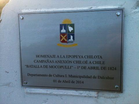 Monumento a la Batalla de Mocopulli de 1826 a un lado de la ruta 5 camino a Castro